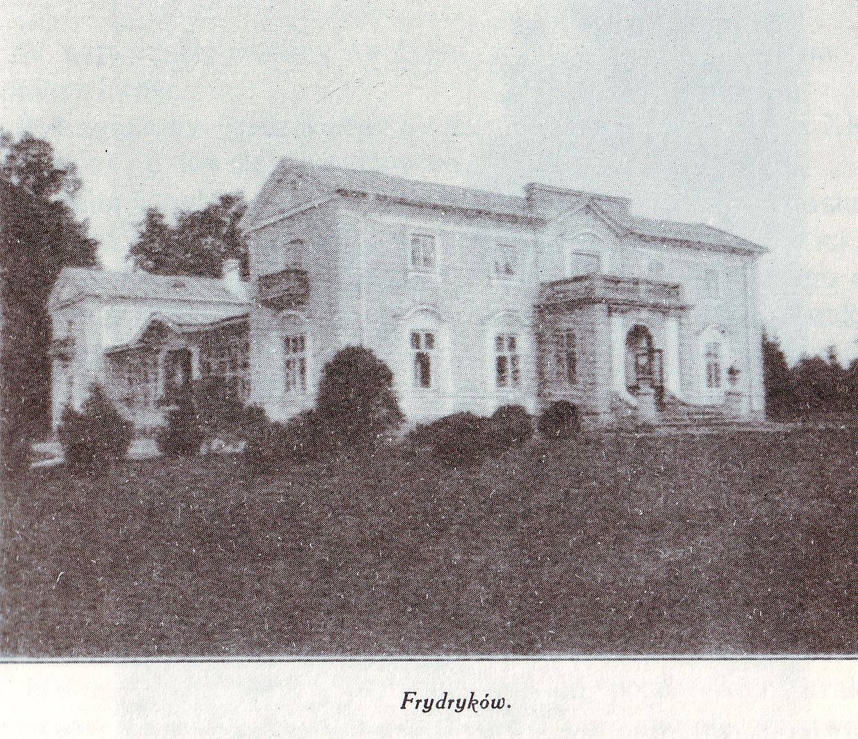 Wołoczyska Frydryków